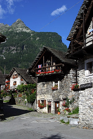 Sonogno